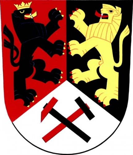 Znak, Sobotín, okres Šumperk